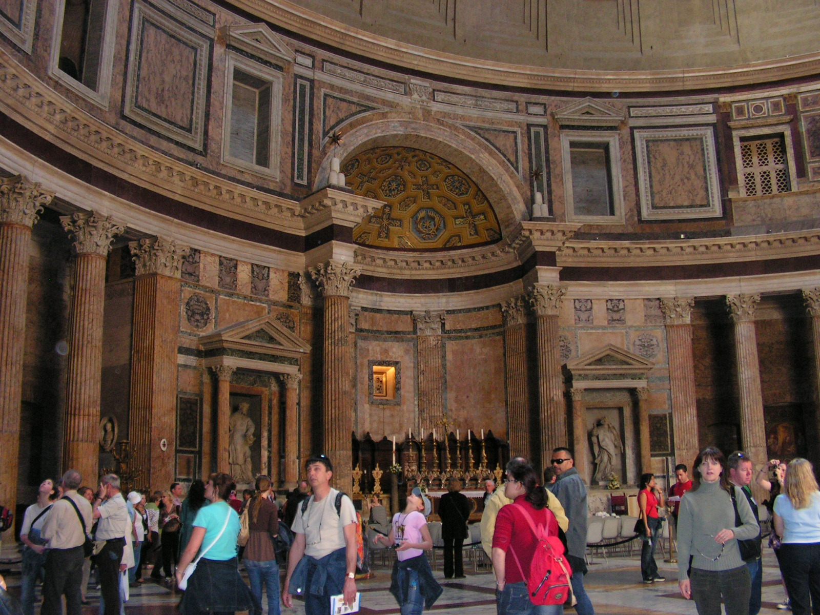 Wnętrze Panteonu w Rzymie.